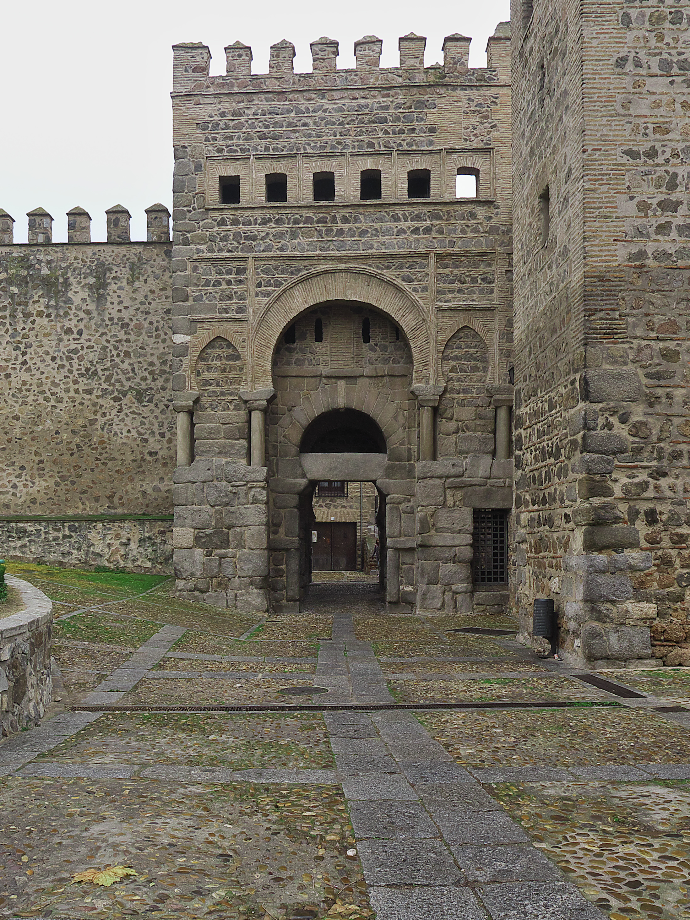 Testigo de la etapa califal en Tulaytula. La Bab-Shàgra, la puerta del campo. La puerta más antigua del recinto amurallado, por ella, entró en ciudad Alfonso VI de León (1085), por lo que también es conocida por Puerta de Alfonso VI. Ofrece el arte y la arquitectura islámica de mediados del siglo X, a la que se añade la mudéjar del siglo XIII.